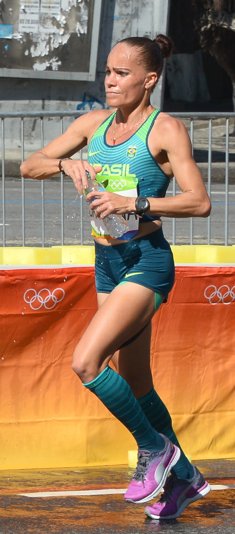 Passage du marathon des jeux olympiques de Rio 2016 dans le centre de Rio